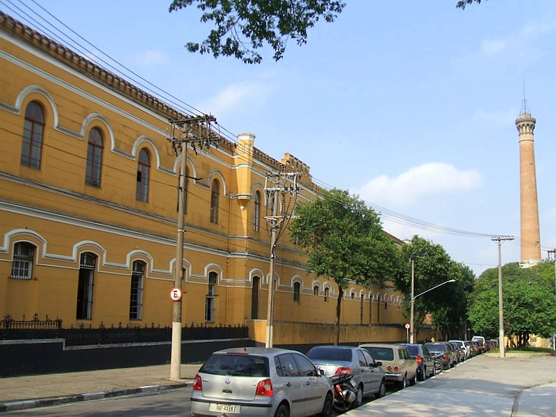 Quartel da Luz (Batalhão Tobias de Aguiar) no Bom Retiro, São Paulo, Brasil. Ao fundo, a Chaminé da Luz.